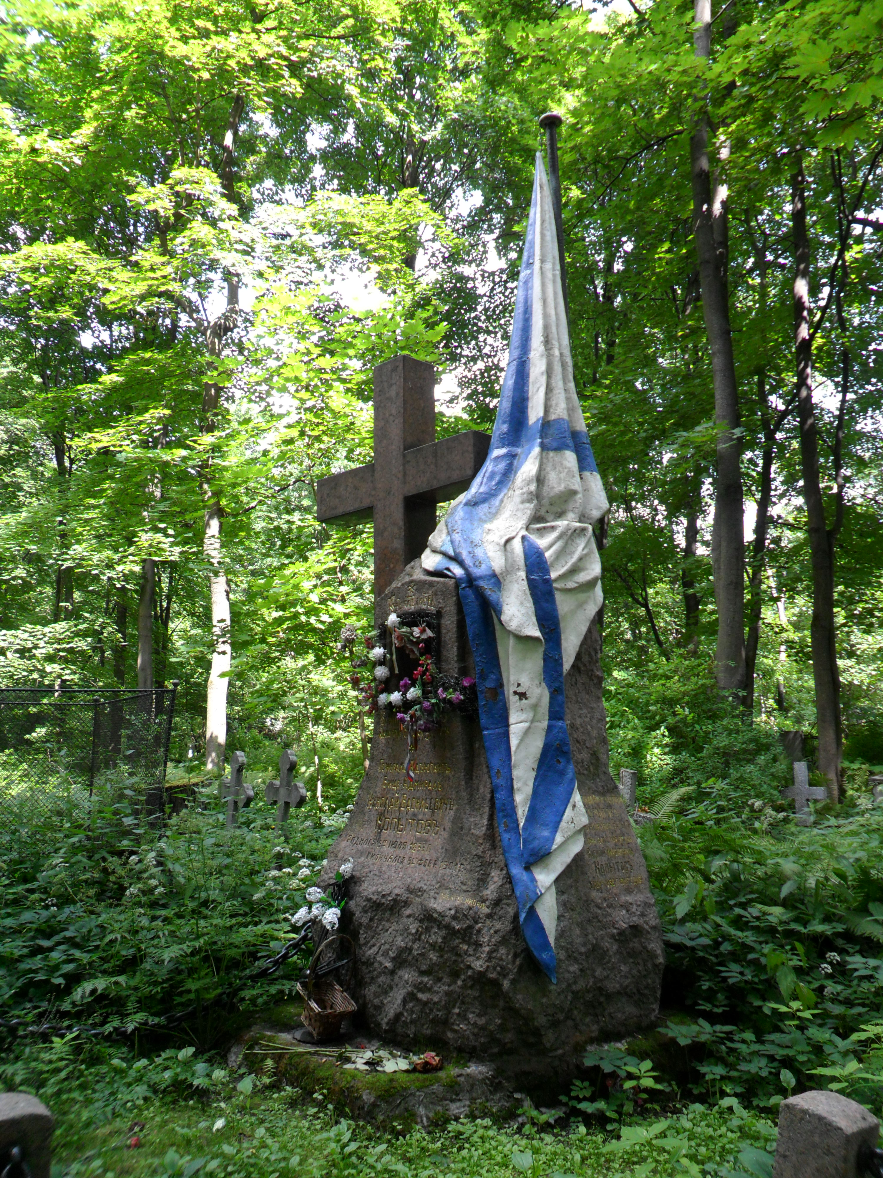 Могила адмирала Николая Васильевича Копытова на Смоленском православном кладбище в Санкт-Петербурге